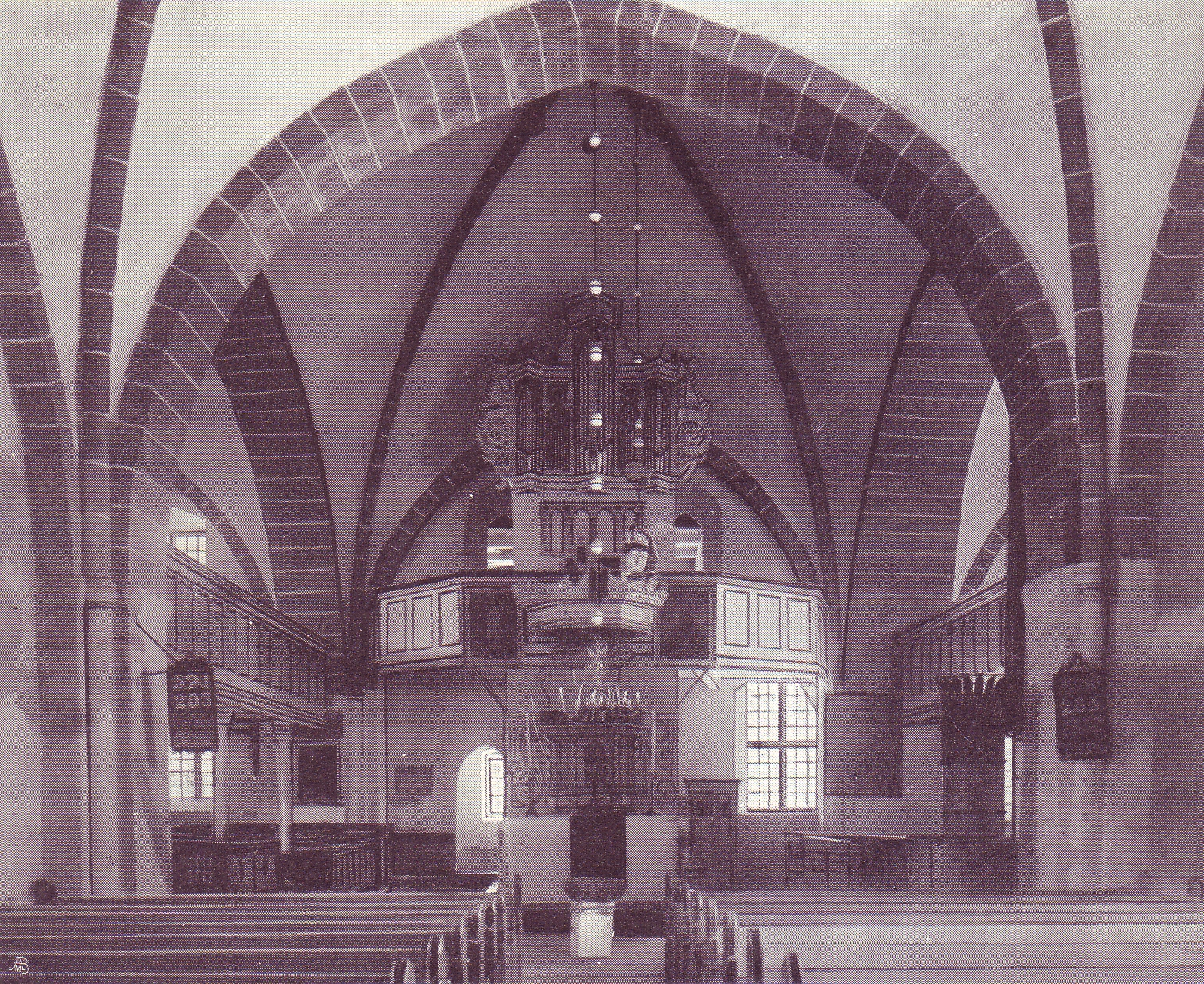 St. Marien (Stemwede-Dielingen)